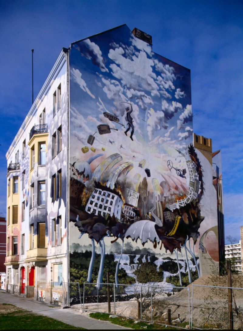 Das Thomas-Weisbecker-Haus von schräg rechts Aufgenommen - Wandbild von Andreas Dornbusch (Dorni)